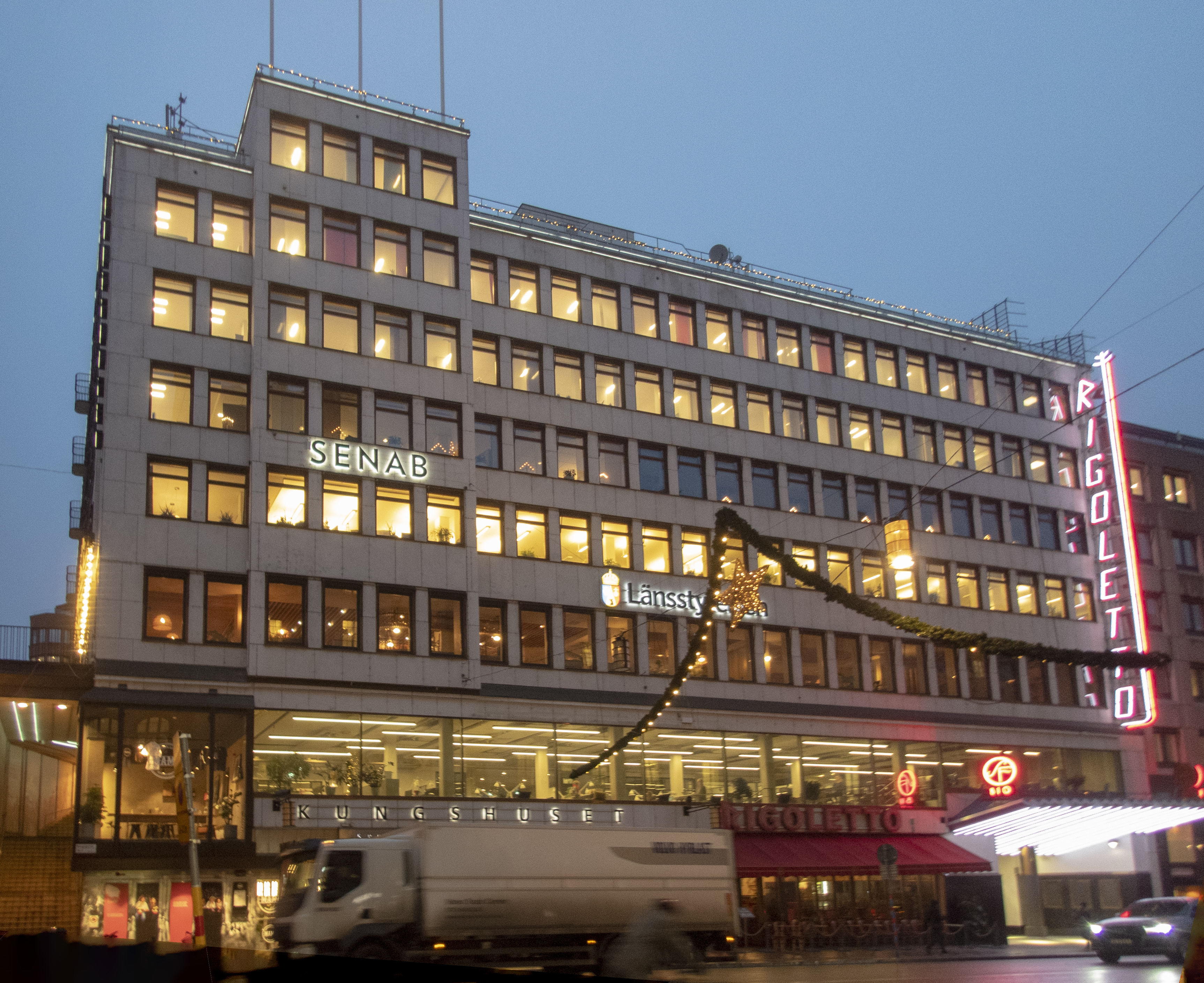 Kungshuset, Kåkenhusen 37,Kungsgatan 16-18 Stockholm Nybyggnadsår 1938 - 1940 AB Byggindustri (Byggmästare) Fastighets AB Kungshuset (Byggherre) Hagstrand & Lindberg (Arkitekt) R Engströmer (Arkitekt) Sture Frölén (Arkitekt)